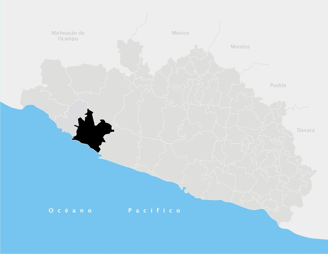 Municipio de Petatlán, Guerrero (México) .